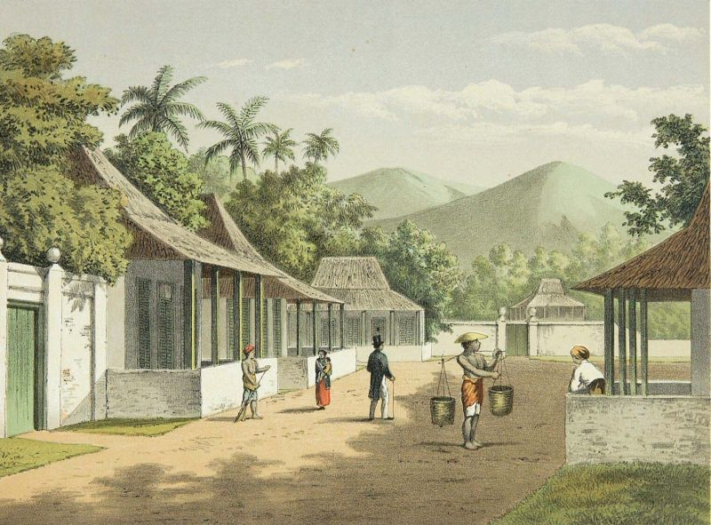 Litho. De chromolitho is gemaakt naar een tekening van J.C. Rappard.. Straat in Ambon